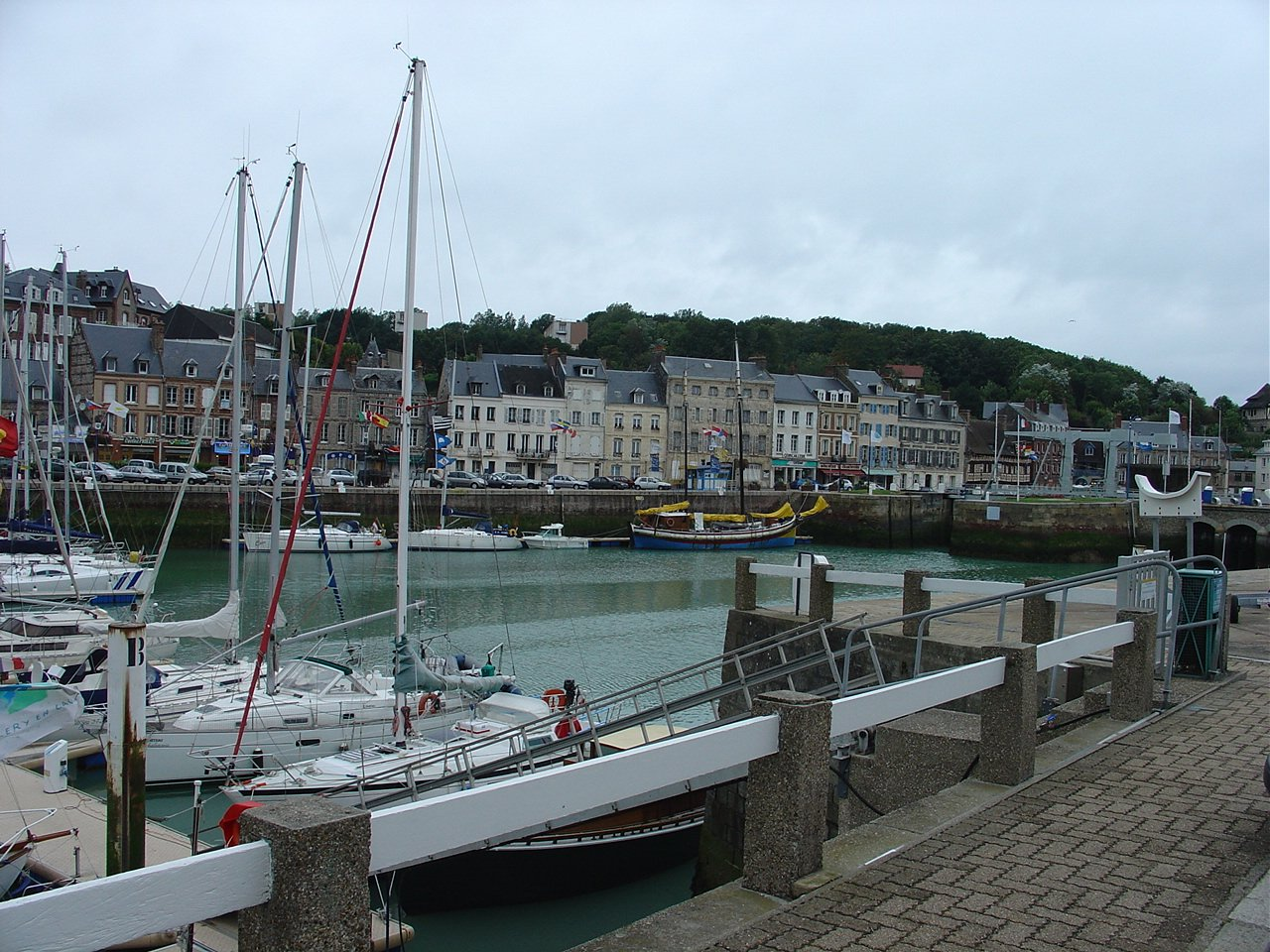 Porto di St._Valéry_en_Caux